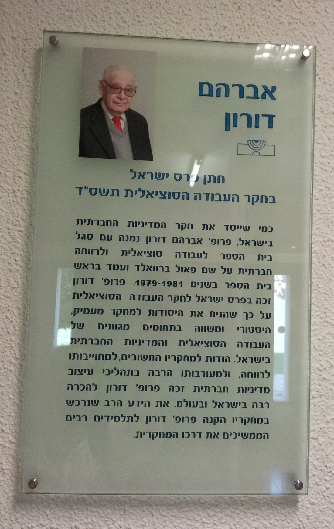 שלט אברהם דורון בפתח בית הספר לעבודה סוציאלית בקמפוס האוניברסיטה העברית בהר הצופים